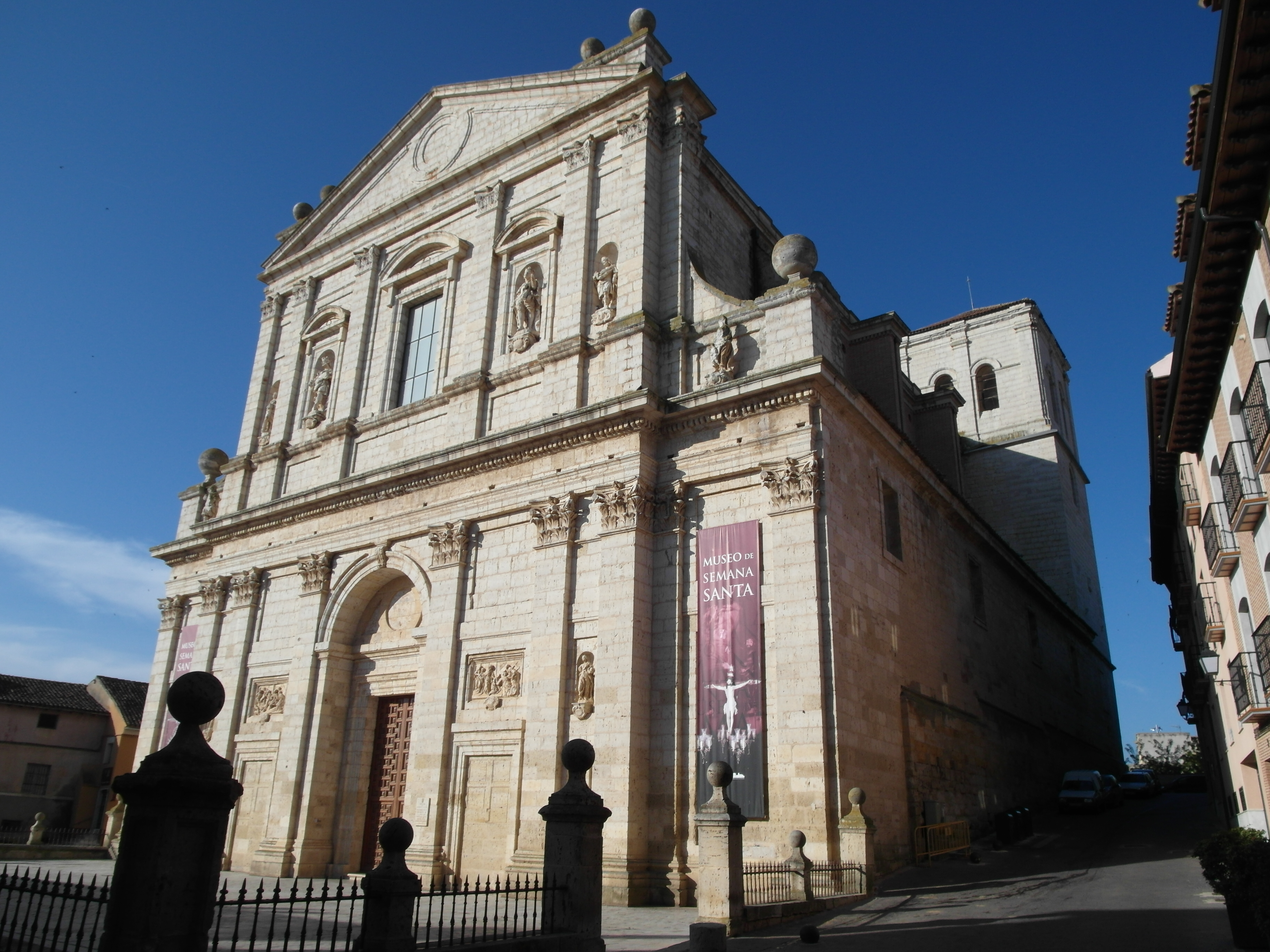 Iglesia de Santa Cruz, Medina de Rioseco, Valladolid.